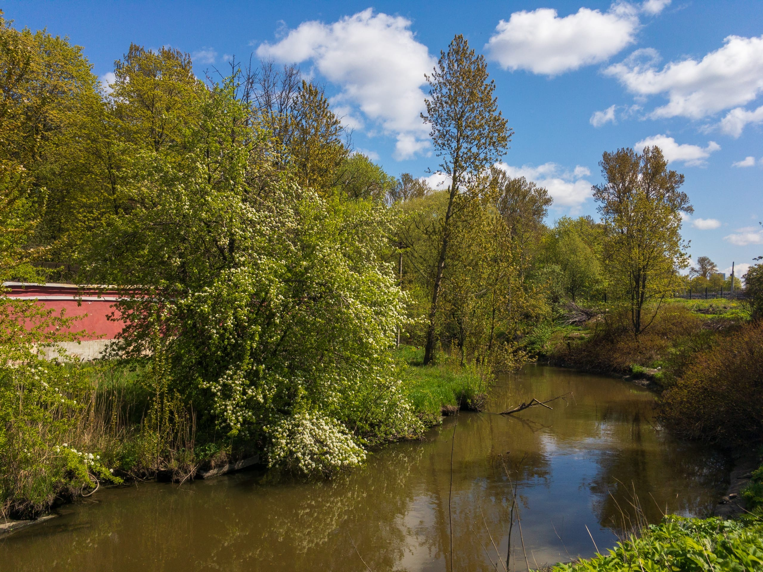 Красненькая речка в районе кладбища